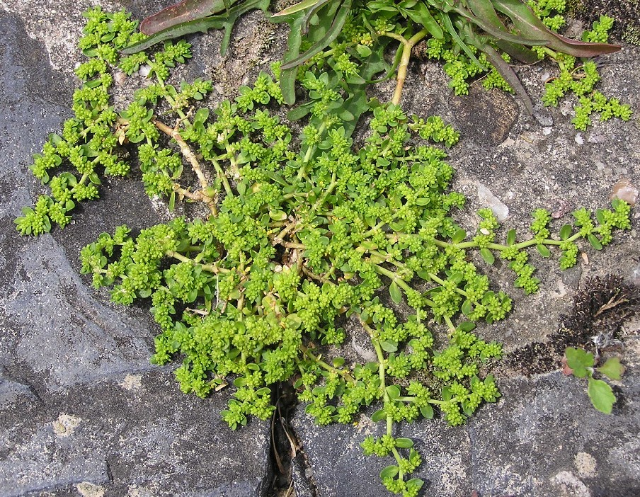 Herniaria glabra am Rheinufer bei Bonn.